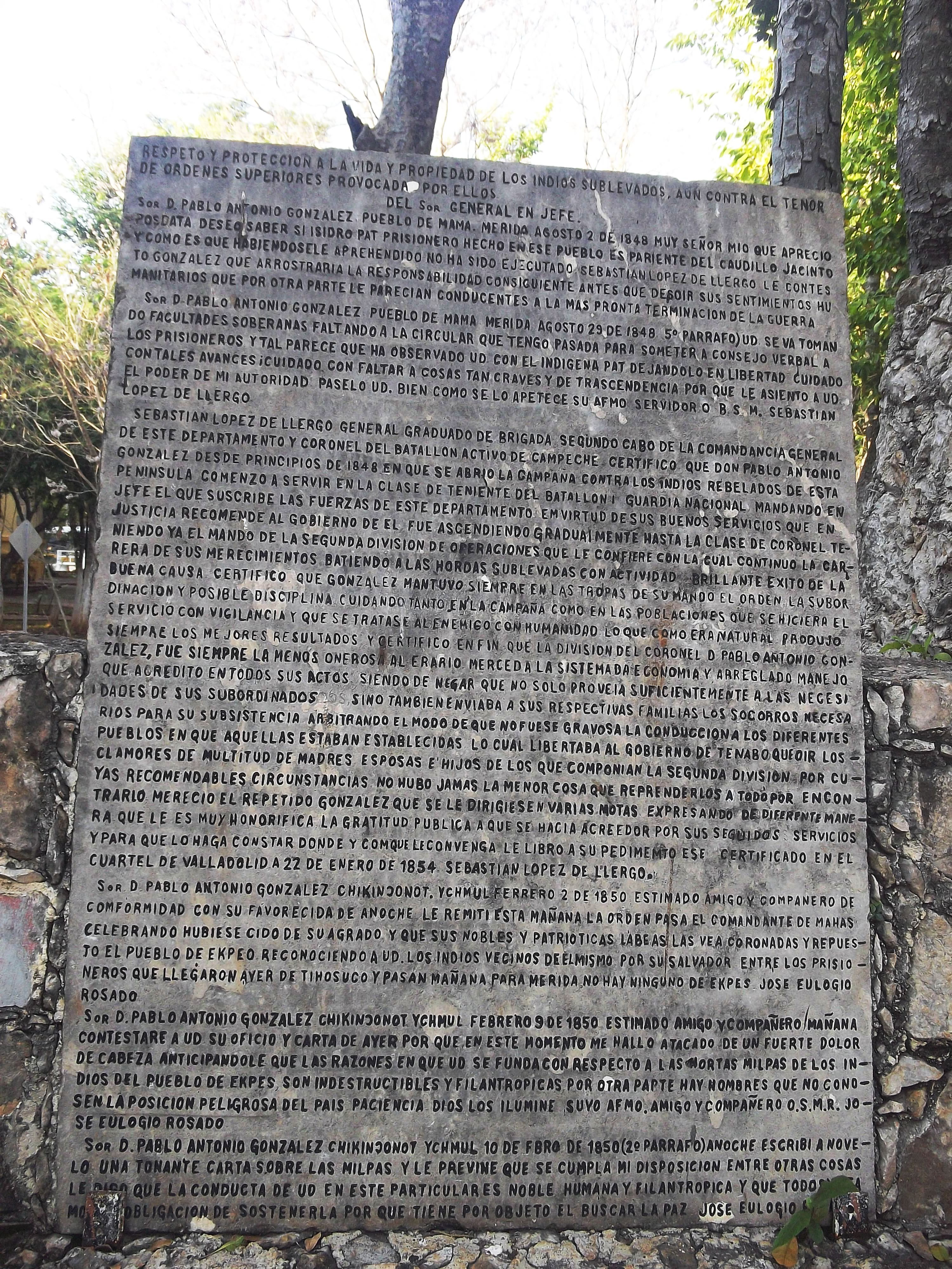 Parque Zoológico del Centenario en Mérida, Yucatán.